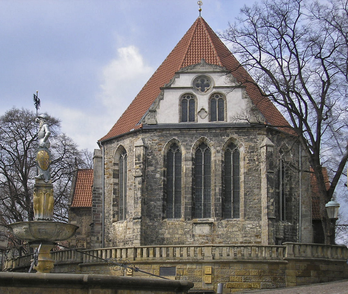 Bachkirche in Arnstadt (Thüringen). Mit Zustimmung des Autors bearbeitet (Ausschnitt ohne Parteiwerbung) durch Wetwassermann